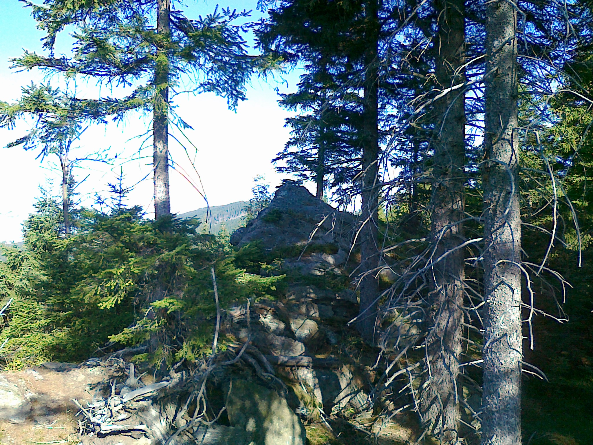 Skalisko szczytowe góry Pytlák - 1040 m n.p.m.